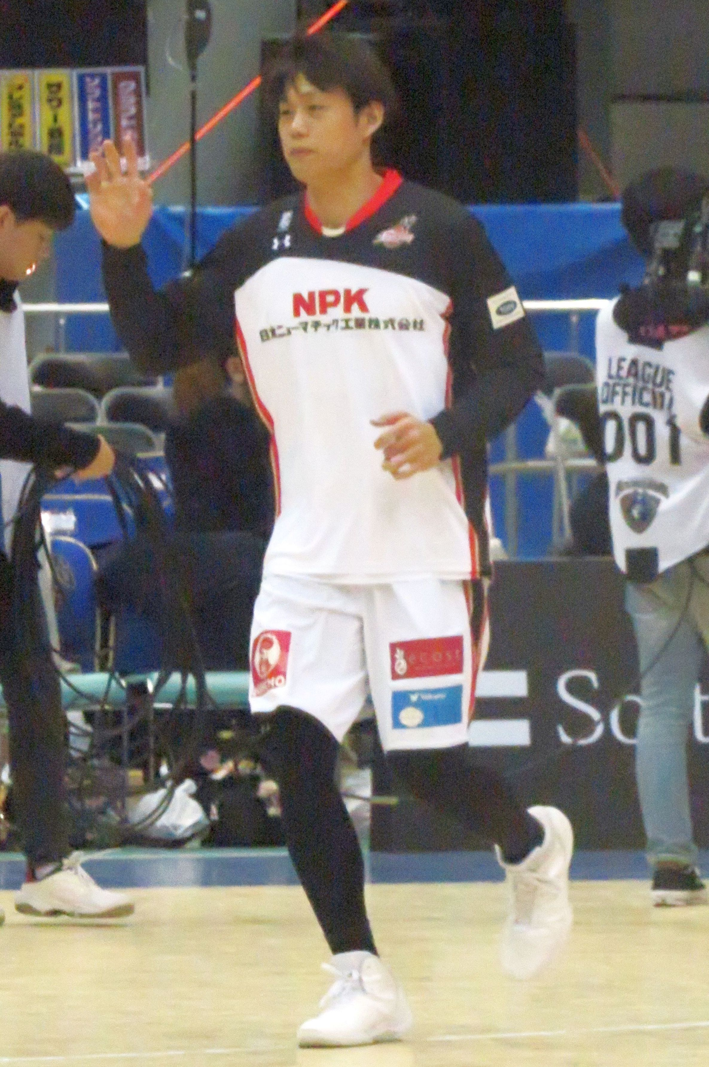 2018年12月15日 2018-19 B1 第14節 横浜-大阪 横浜国際プール